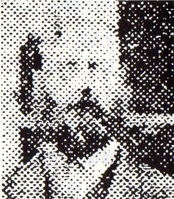 オランダ系アメリカ人の米国オランダ改革教会の宣教師チャールズ・ウォルフ